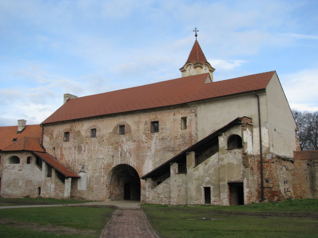 Stari grad u Čakovcu, iznutra